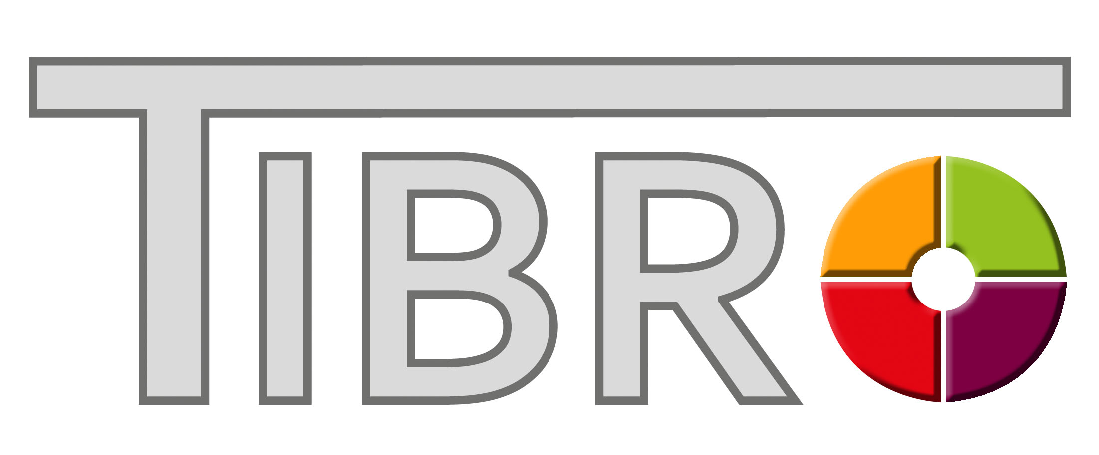 Offizielles Logo des Forschungsprojektes TIBRO